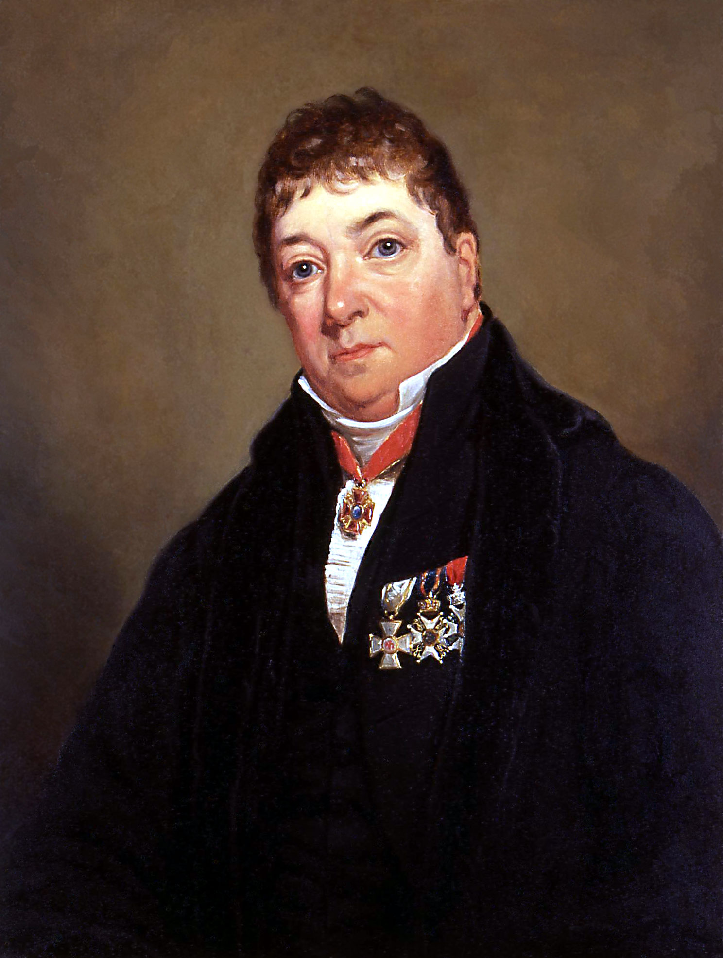 Sebald Justinus Brugmans (1763-1819), arts, botanicus en hoogleraar in meerdere natuurwetenschappen. Collectie Universiteit Leiden - Icones Leidenses 205